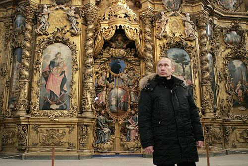 ВОЛОГОДСКАЯ ОБЛАСТЬ. В Троице-Гледенском монастыре.